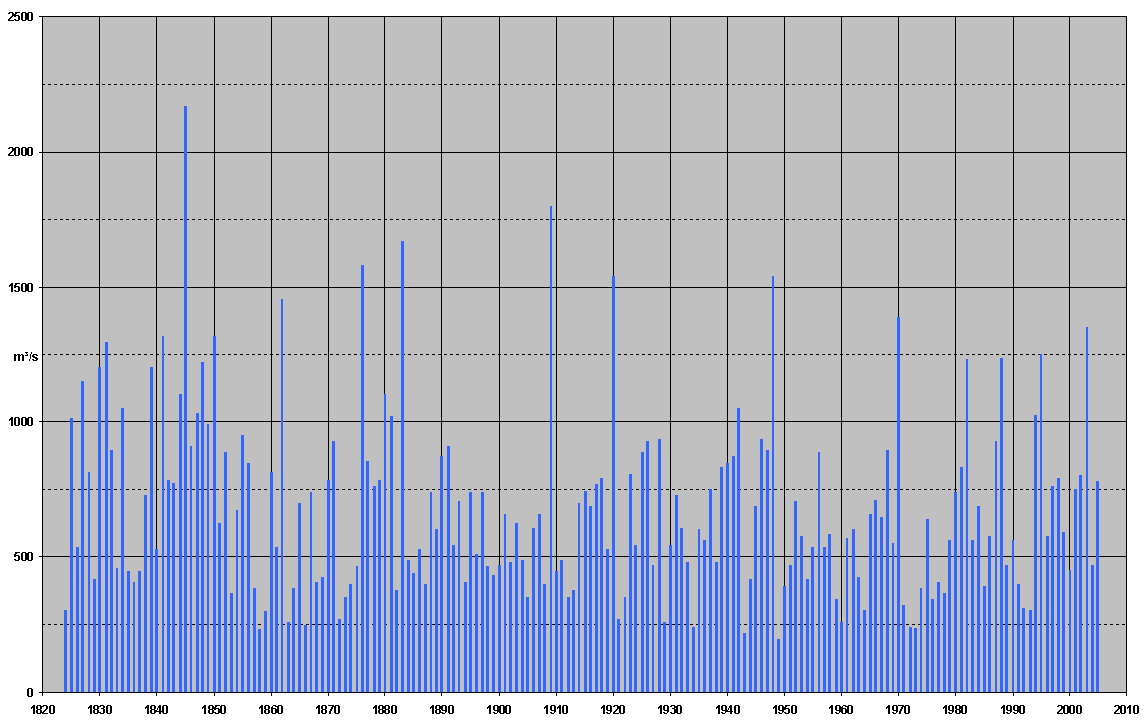 Pegel Würzburg, flowings